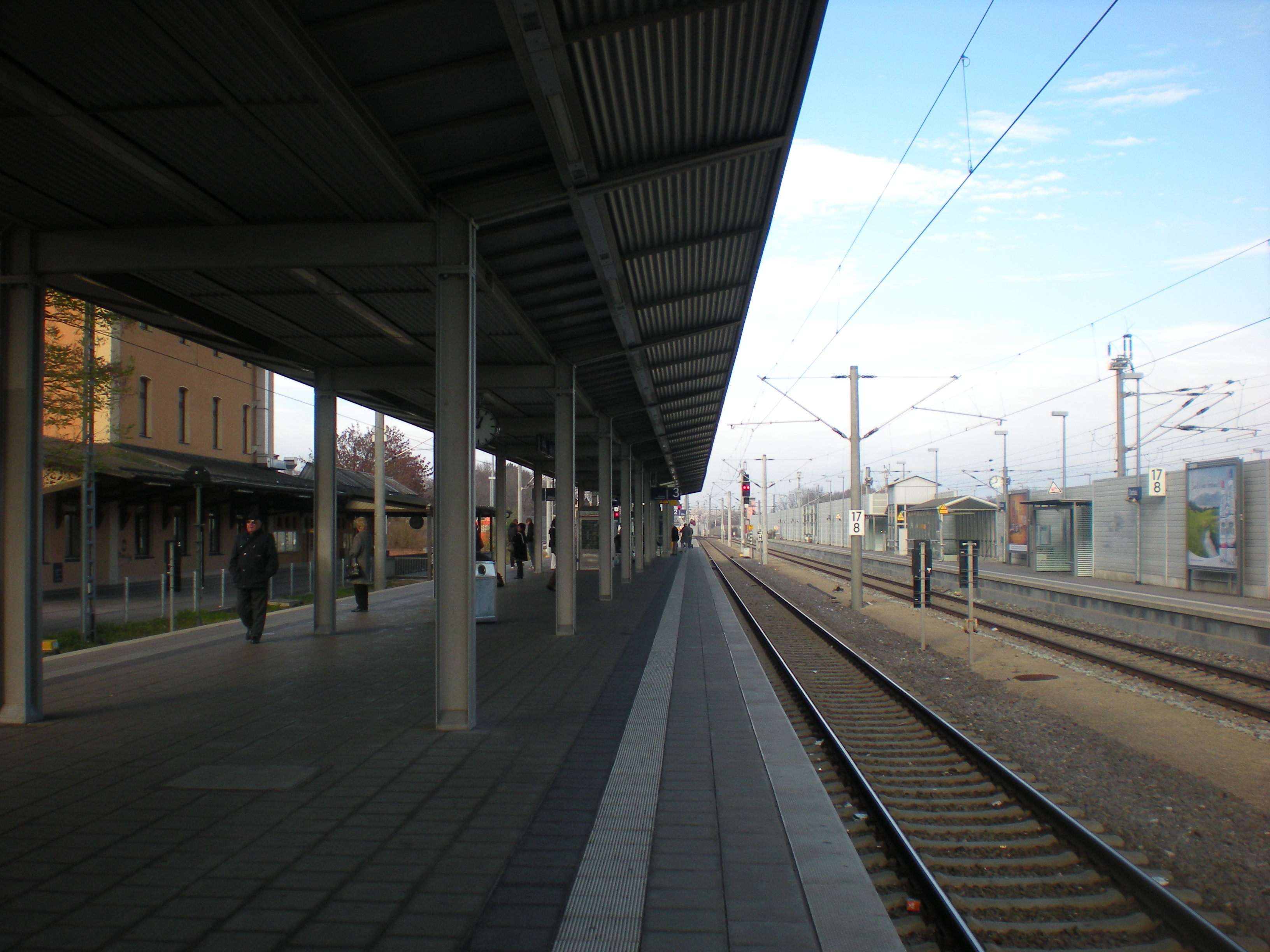 Bahnsteige des Dachauer Bahnhofs